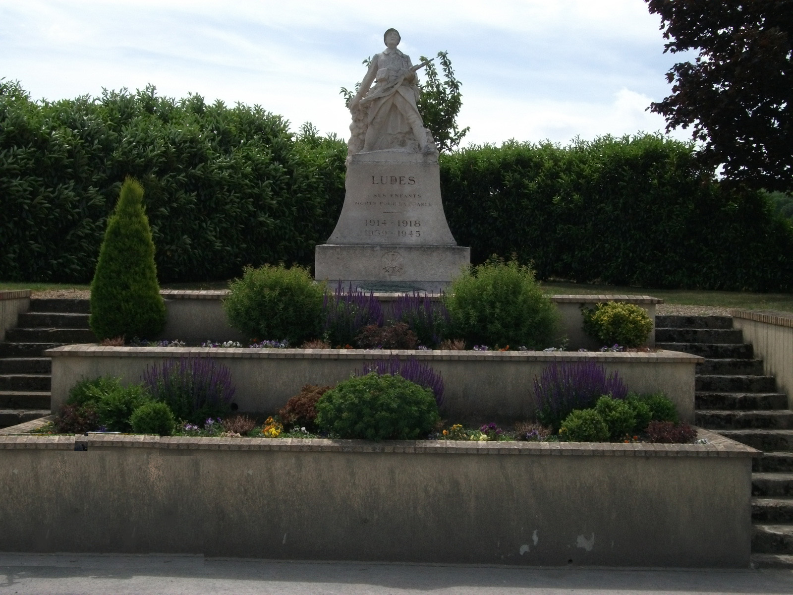 vue du monument aux morts Ludes depuis la route D26.